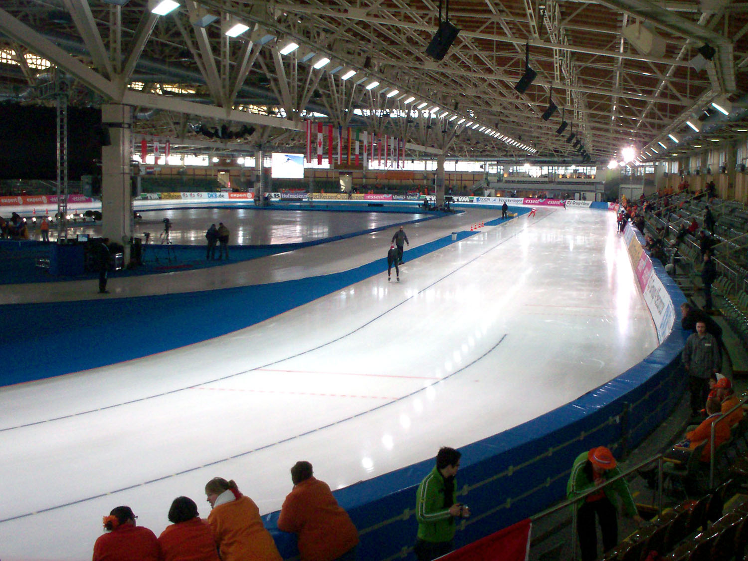 Eisschnelllauf Mehrkampf WM 2008 in Berlin (Berlin, Deutschland)